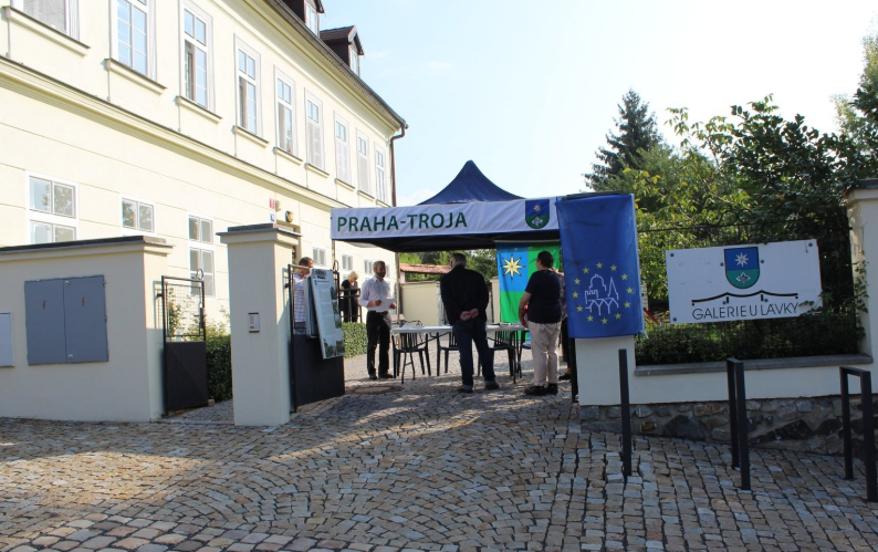 budova galerie2012